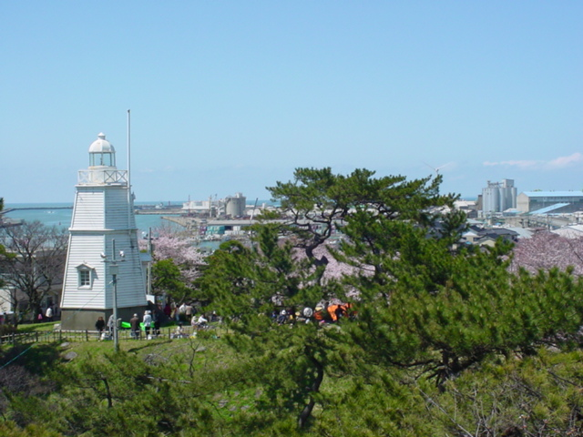 酒田市日和山公園